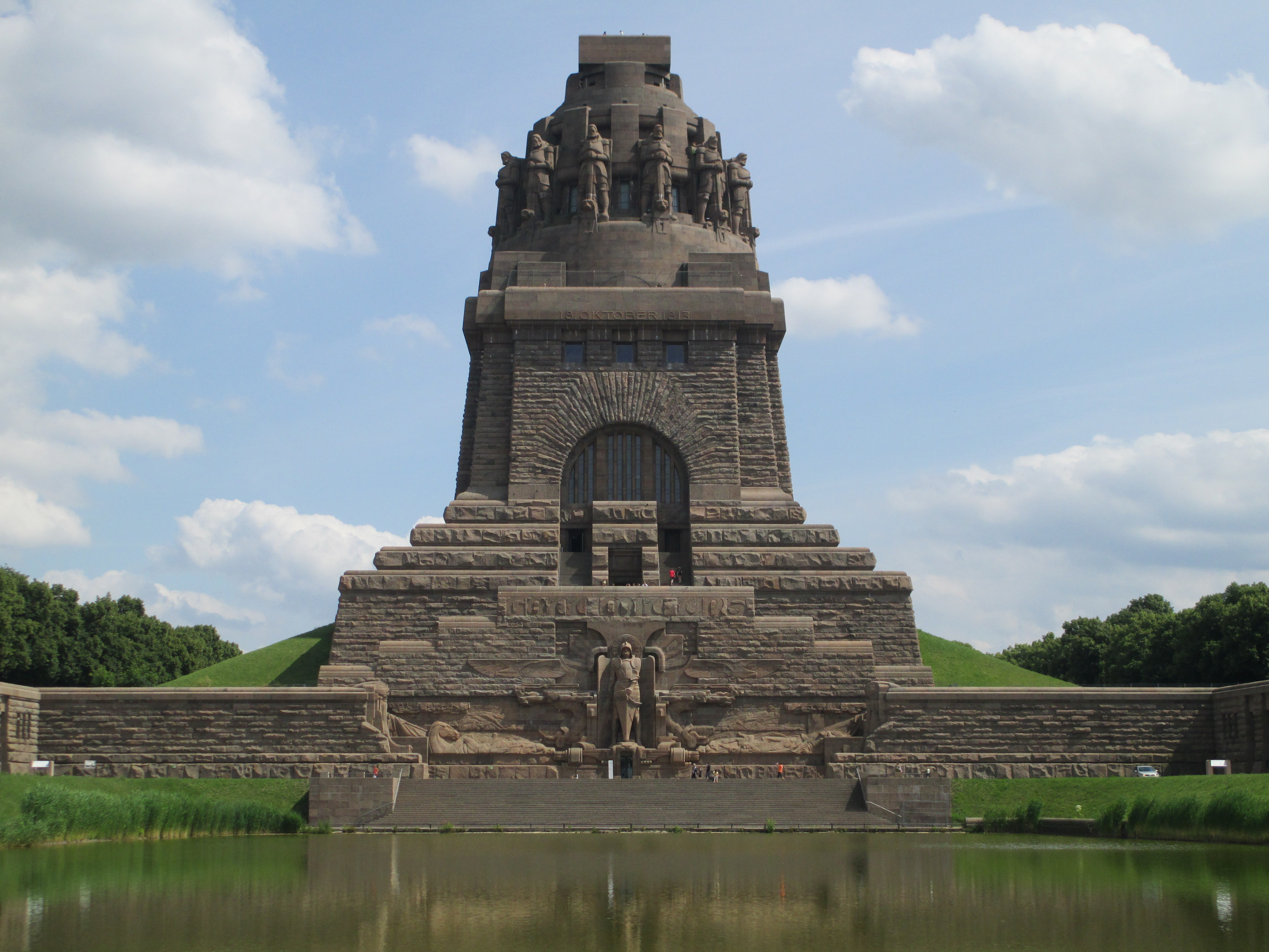 אנדרטת קרב העמים בלייפציג